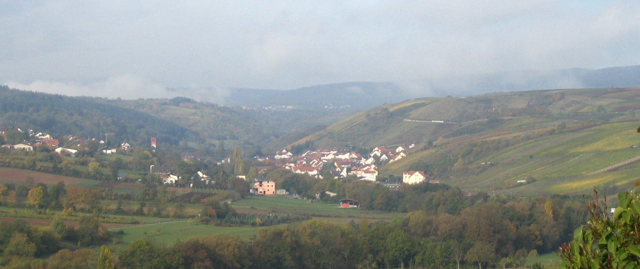 Wallhausen im Gräfenbachtal